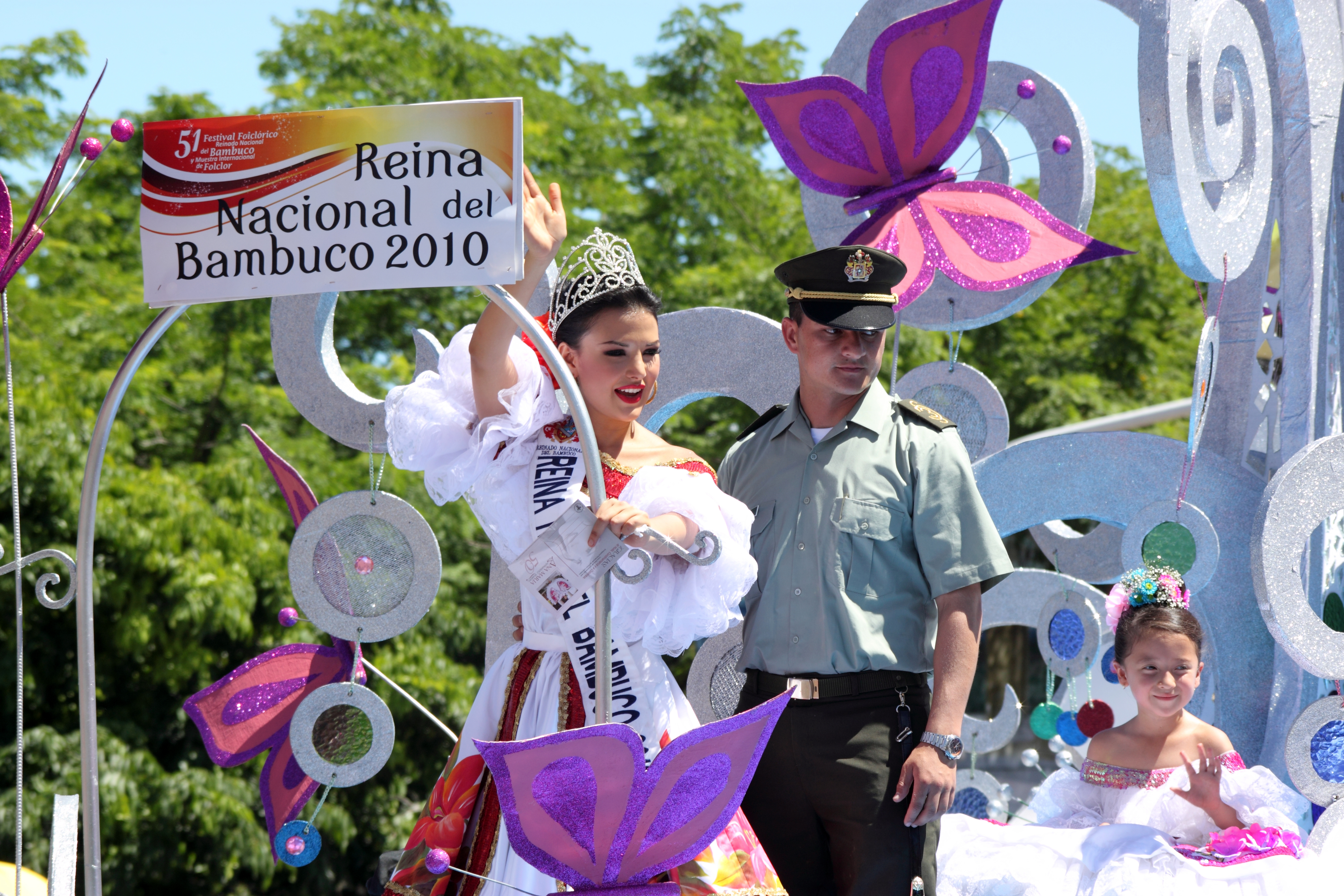 Una de las ganadoras del certamen Reina Nacional del Bambuco